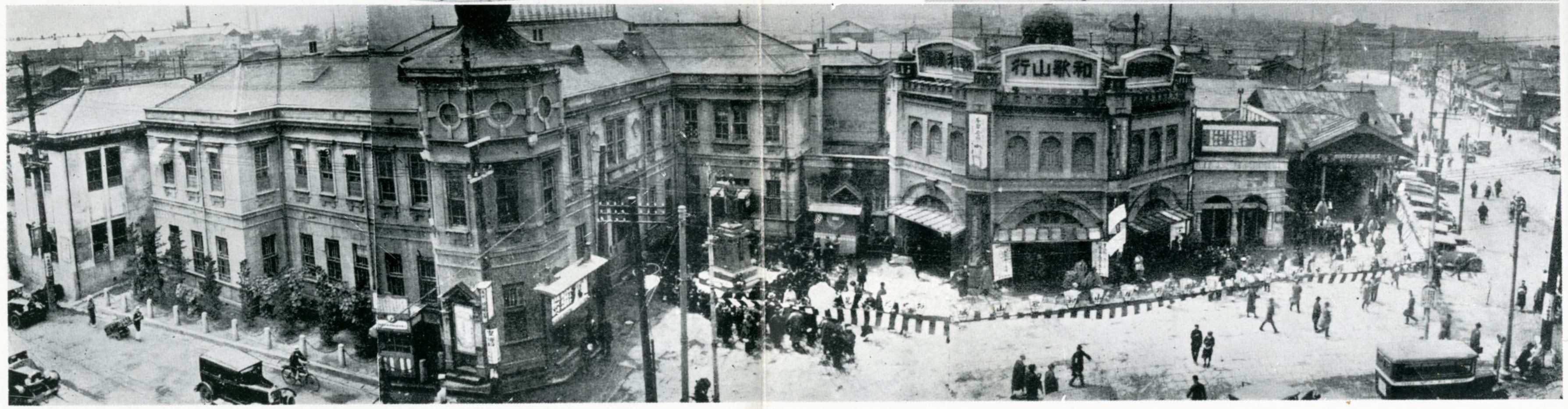 大正時代の南海鉄道難波駅。